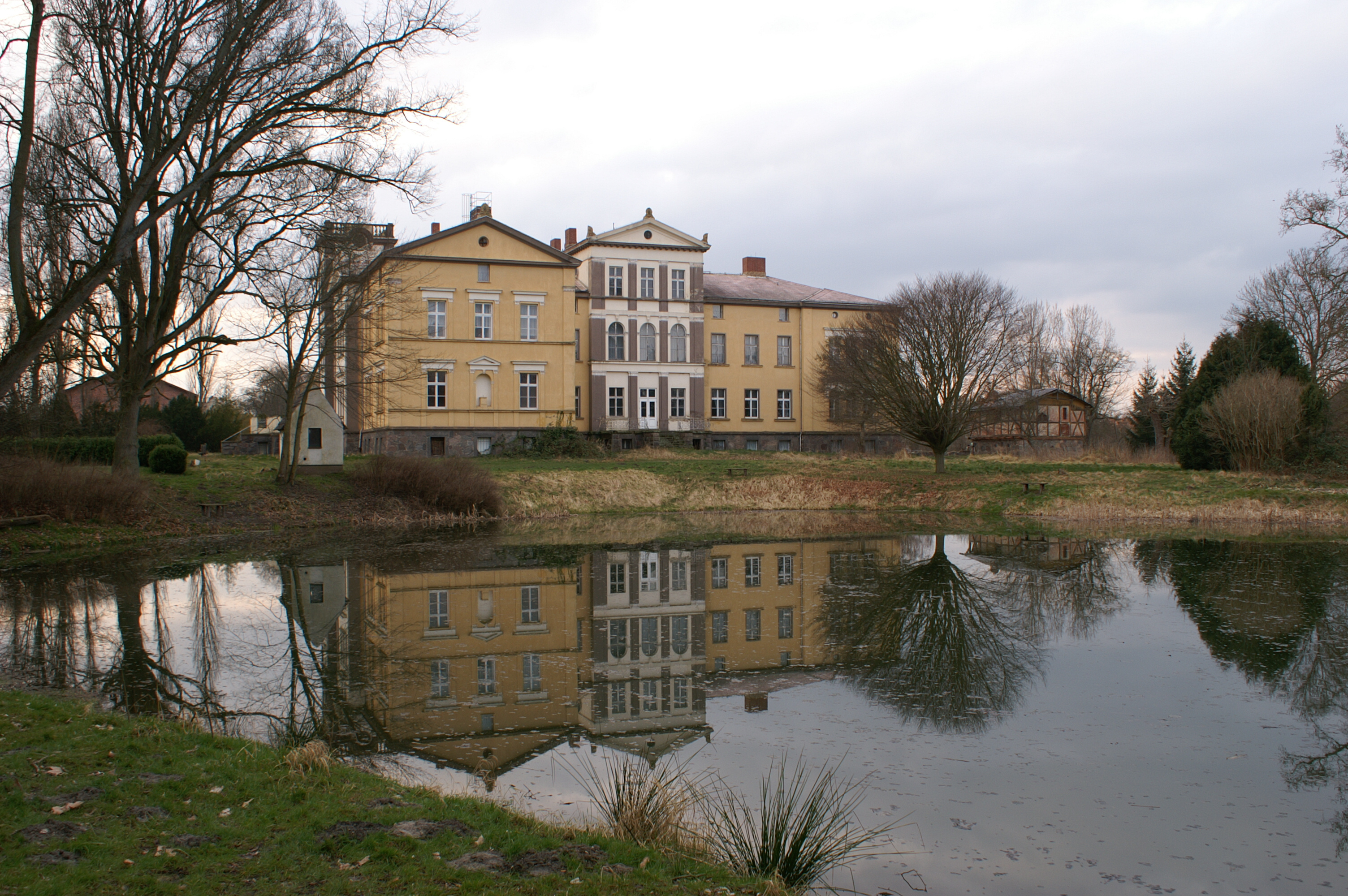 Gültz, Landkreis Demmin, Herrenhaus, Ostseite und Teich